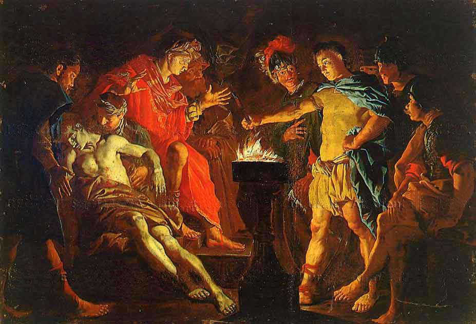 Muzio Scevola